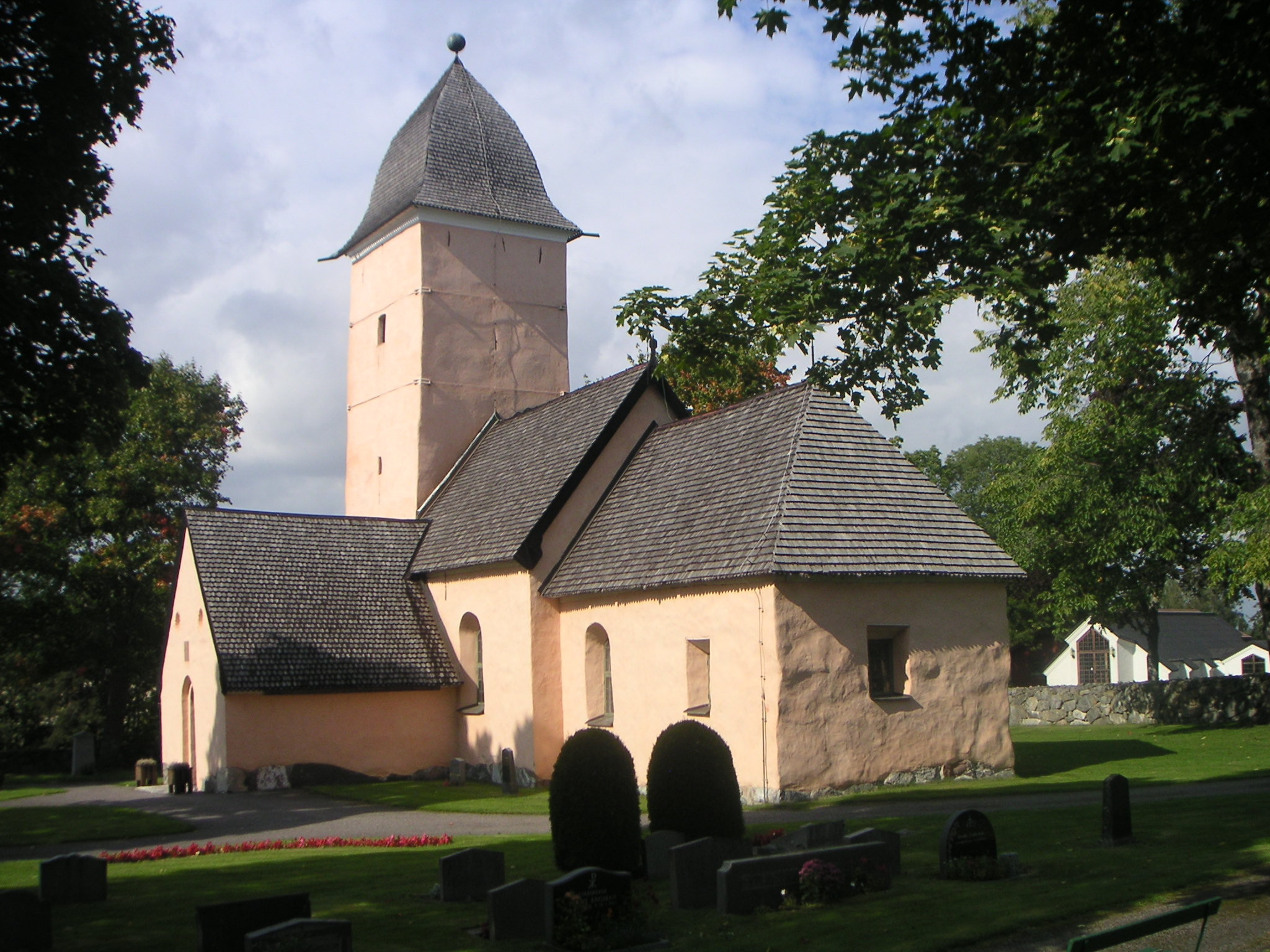 Yttergrans kyrka